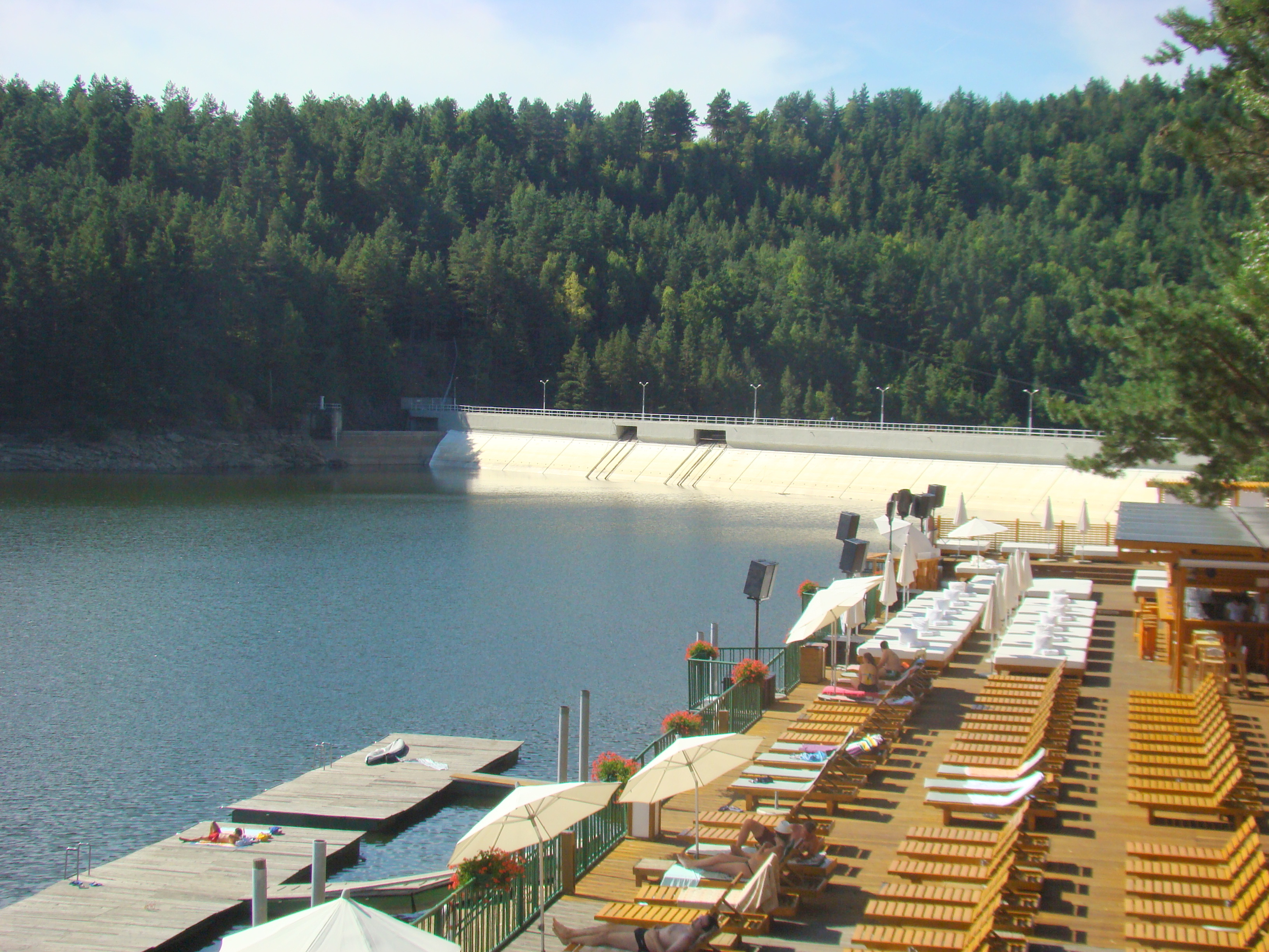 Barajul şi lacul de acumulare Văliug